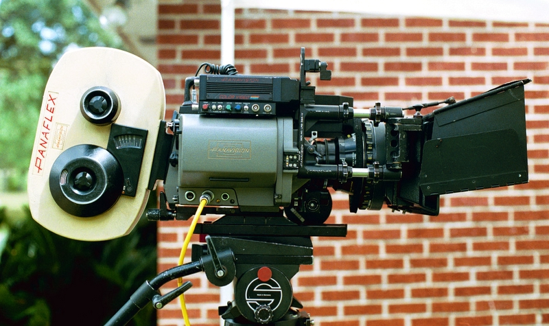 PFX-GII Golden Panaflex® GII Camera System, Movie, 35mm, Camera, Film, Panavision, Panaflex, G2, Movie Camera